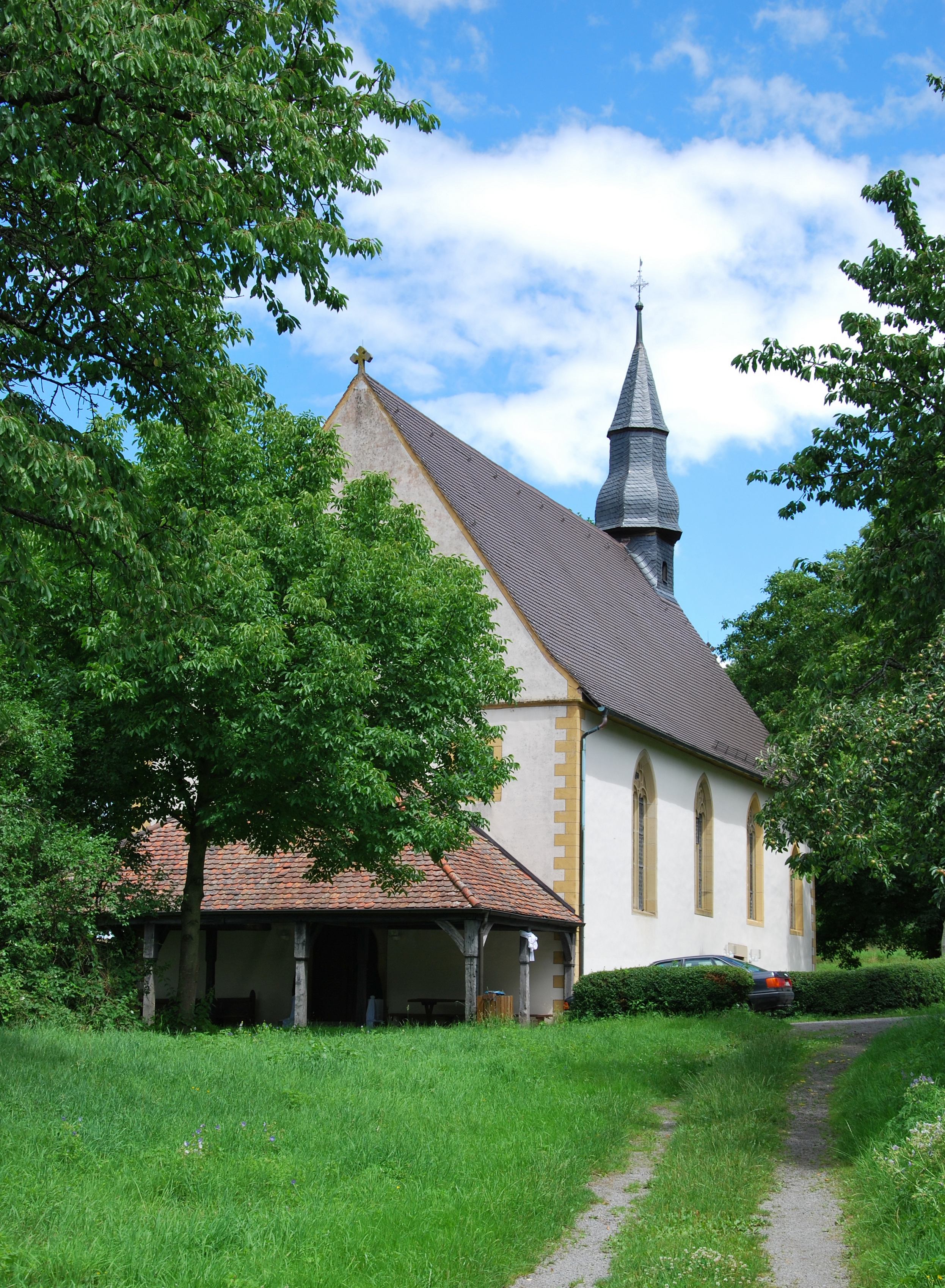 Wallfahrtskapelle Neusaß bei Schöntal. Blick vom Fußweg aus Richtung Kloster Schöntal kommend.